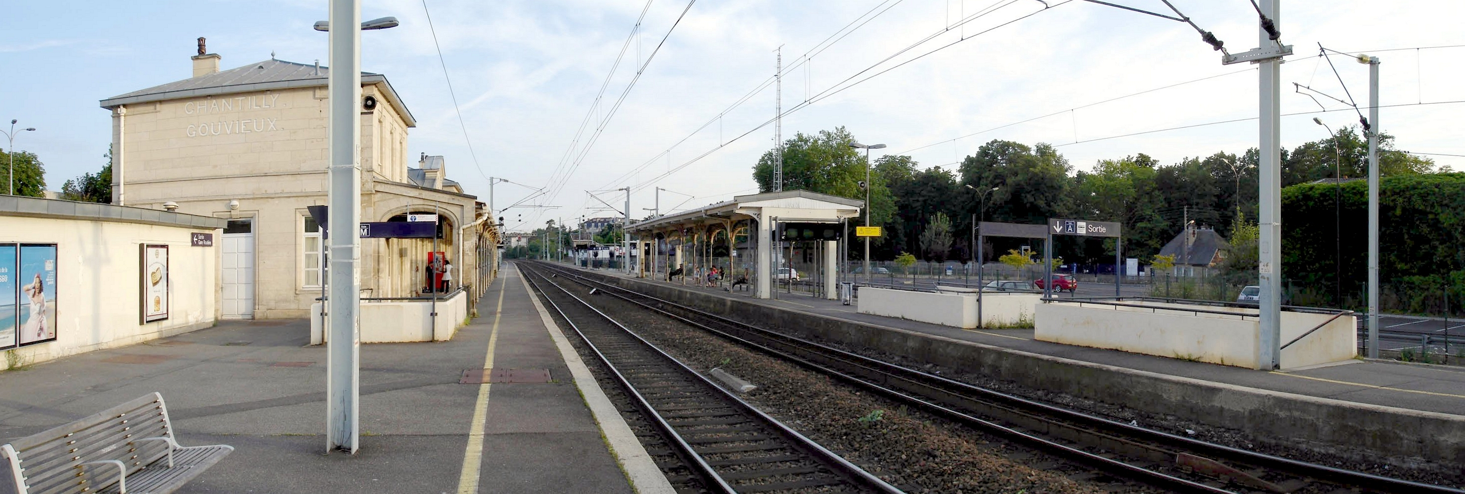 Gare de Chantilly - Gouvieux - Les quais (en direction de Paris) en panoramique